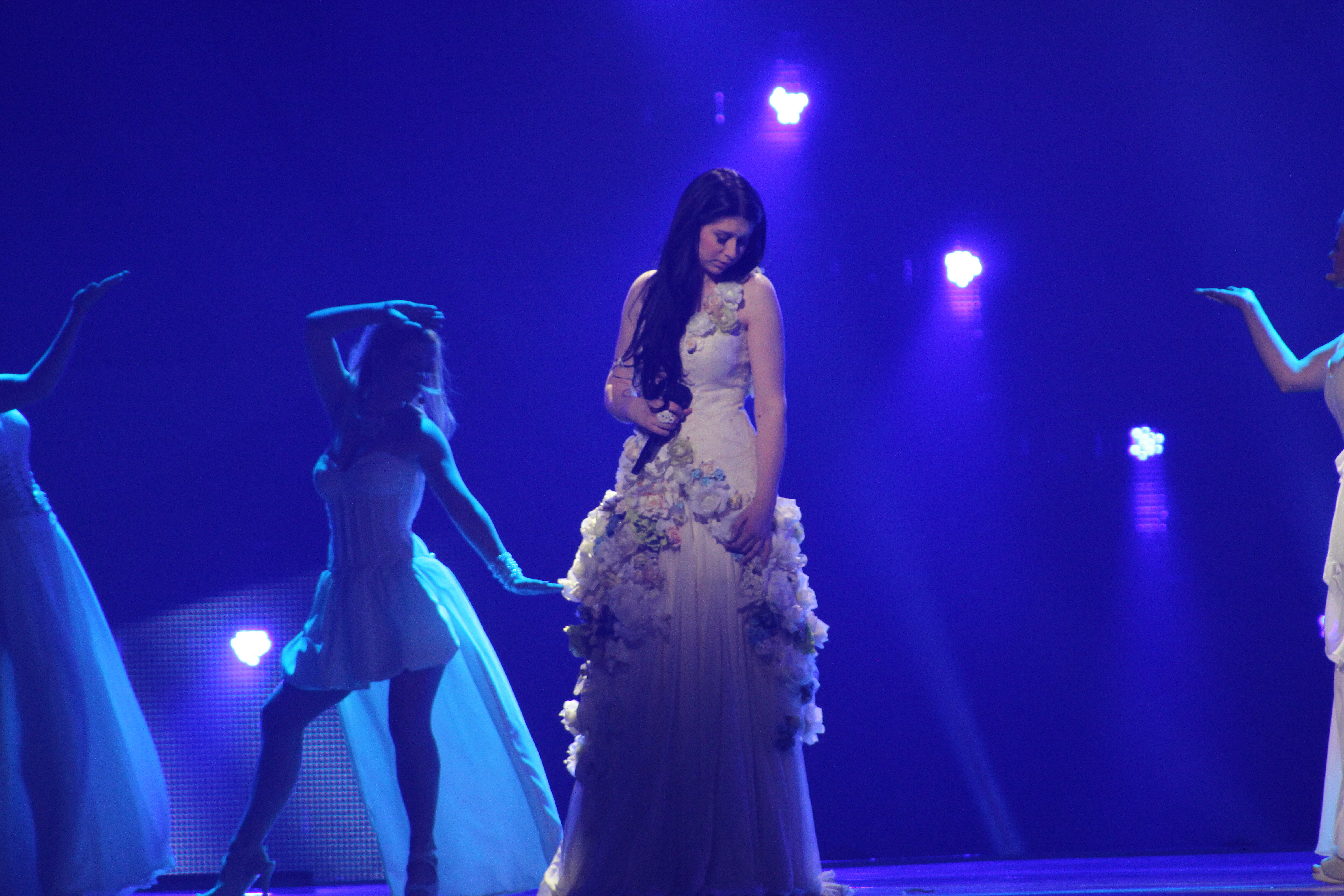 Словения Эва Бото